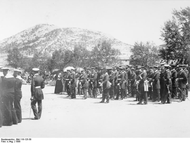 China, Tsingtau Feldgottesdienst in Tsingtau in Anwesenheit Sr. Königl. Hoheit des Prinzen Heinrich (Während der Predigt).